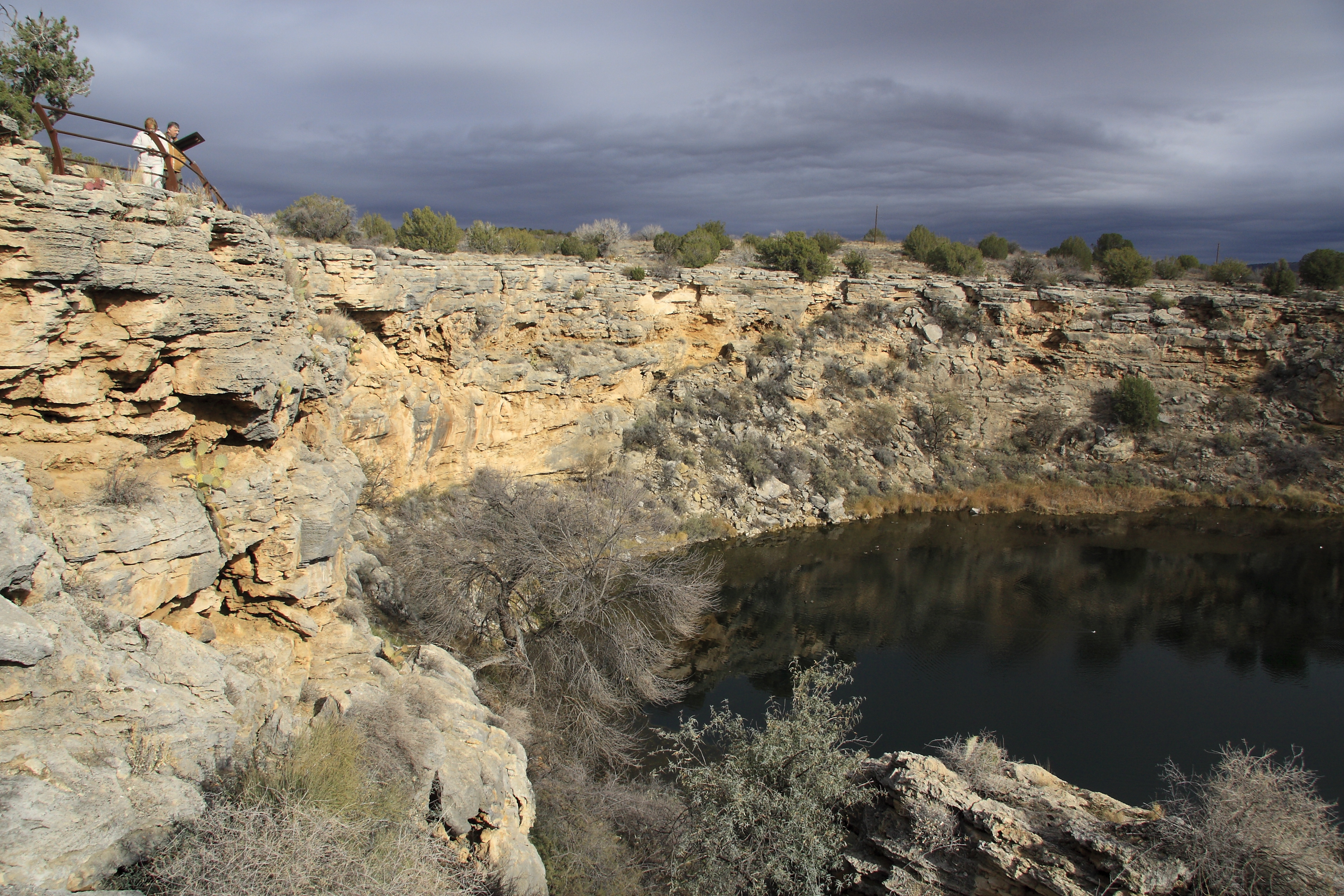 Montezumas Well in winter, Arizona